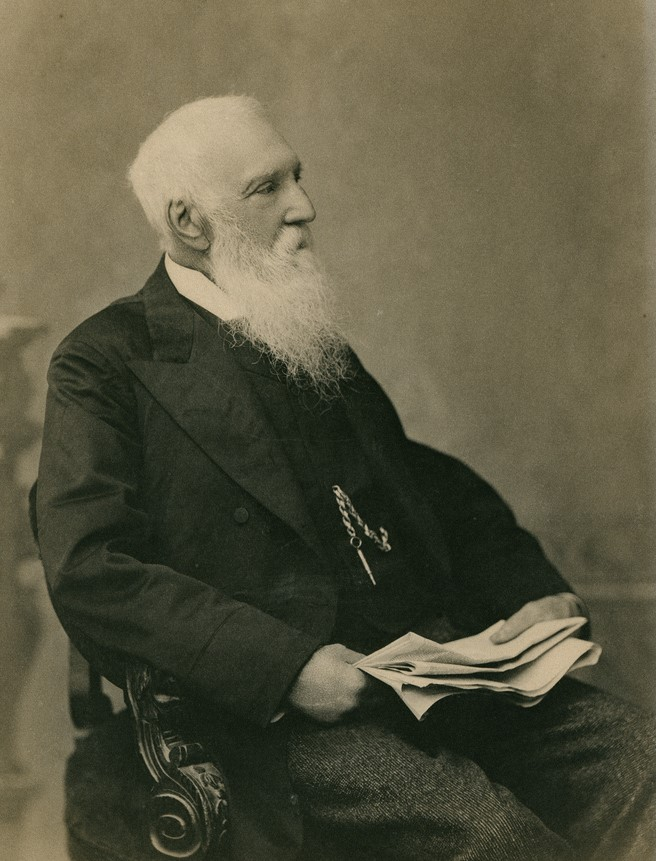 Edward John Eyre